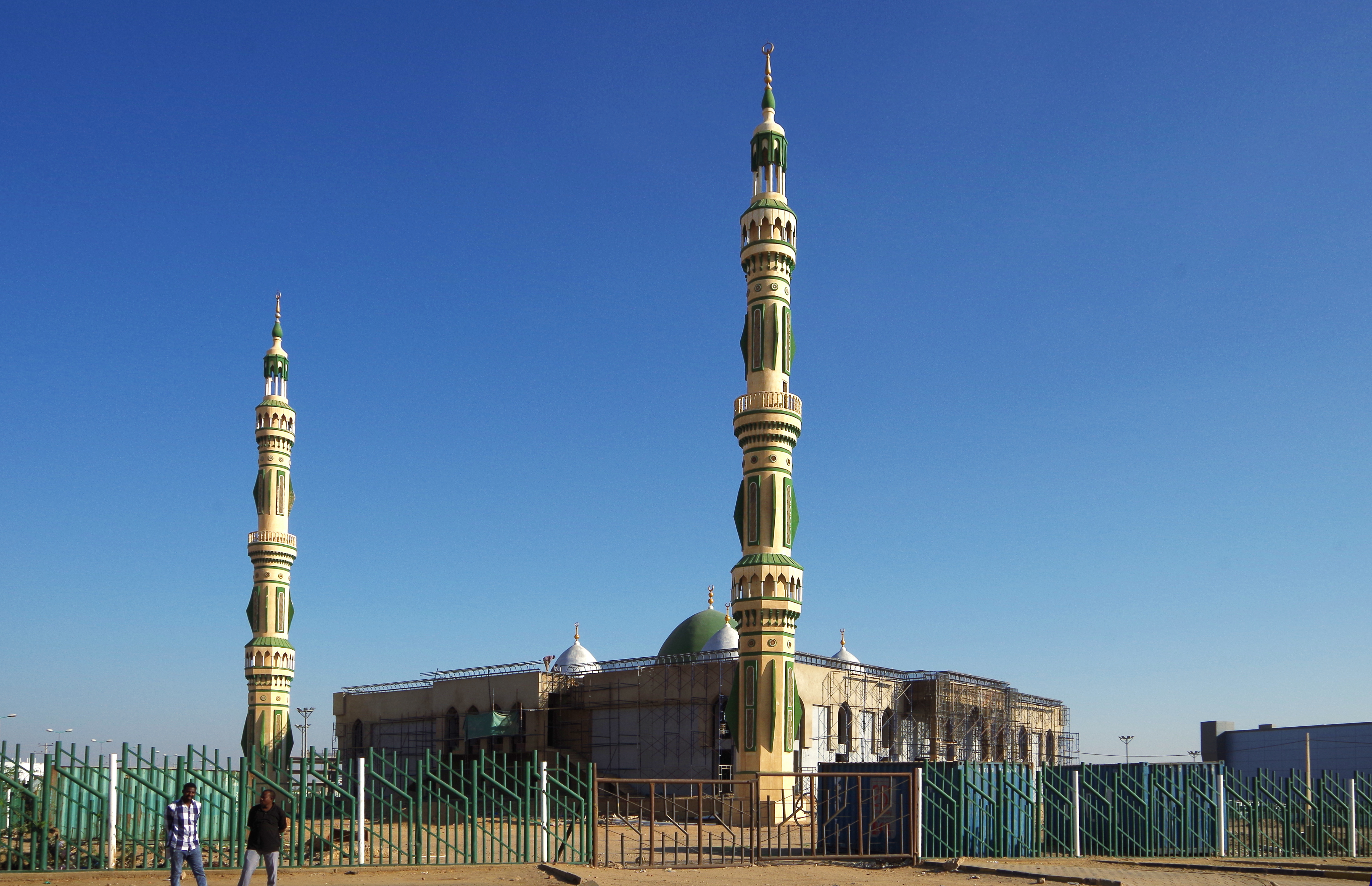 Neue Moschee in Atbarah, Nahr-an-Nil, Sudan